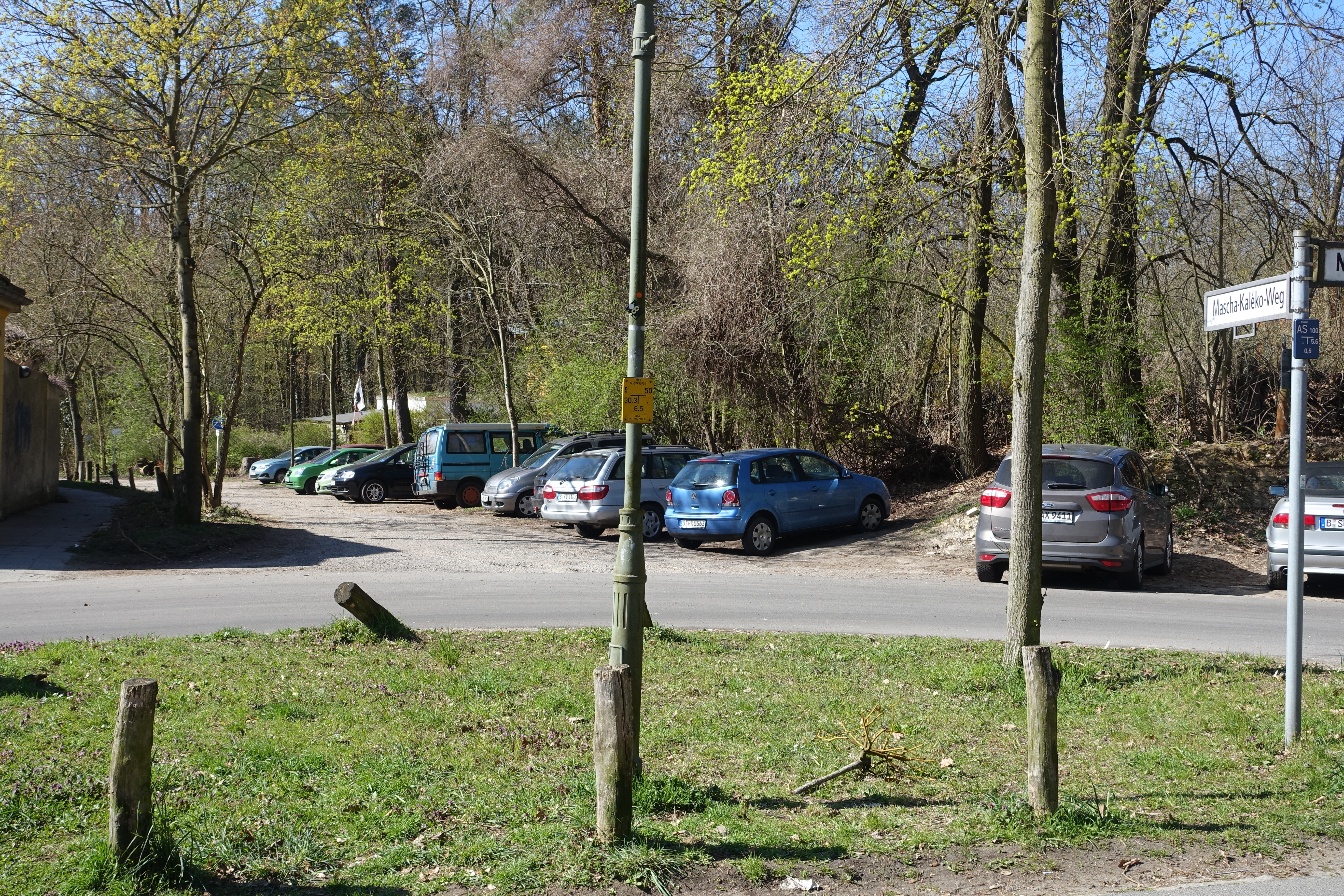 Straßenpanorama